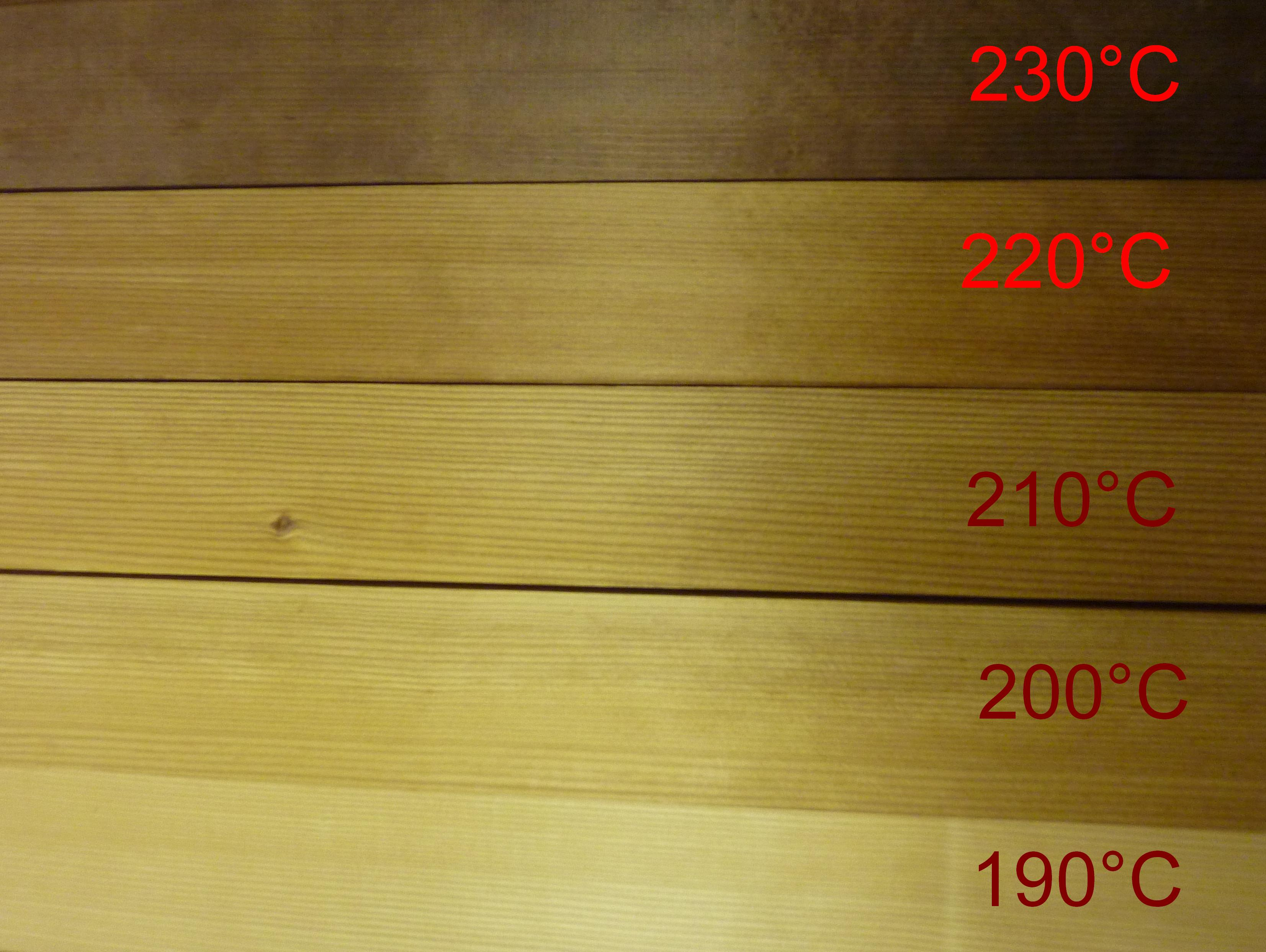 Termicno modificirana smreka